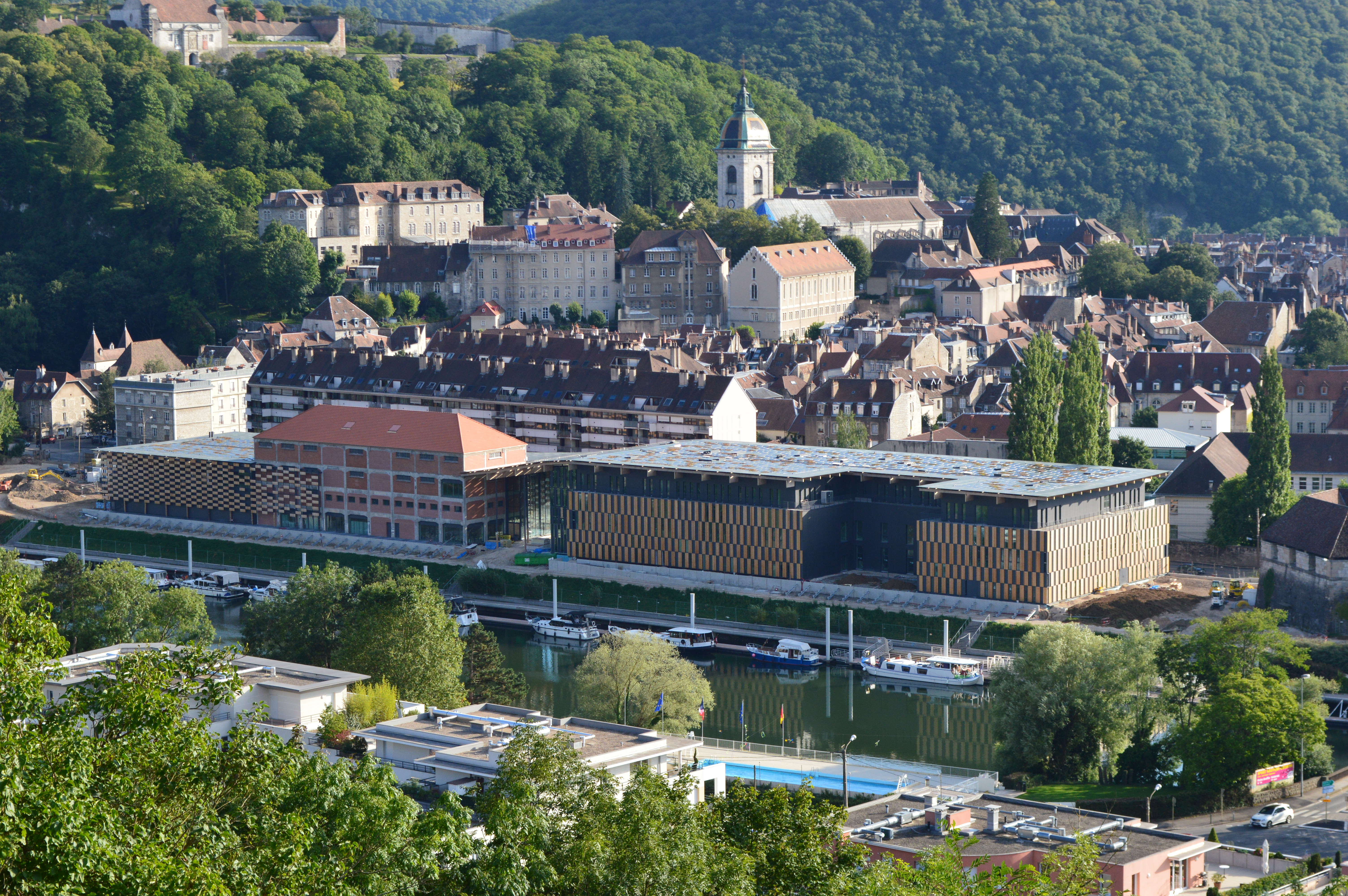 Vue depuis le fort de Beauregard sur la Cité des Arts et de la Culture de Besançon au premier plan, bâtiment en construction en juillet 2012.